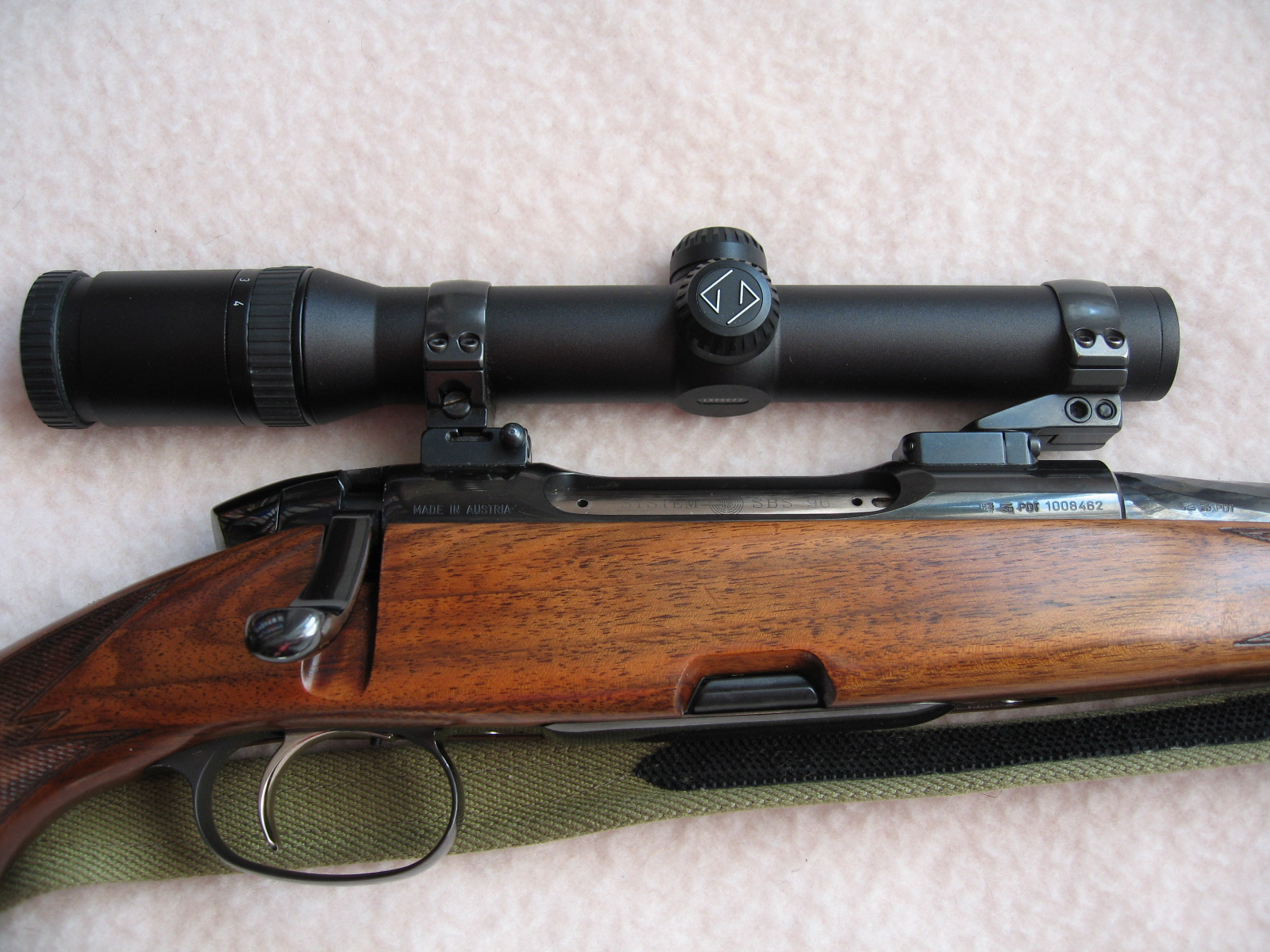 Strelni daljnogled pritrjen na repetirko s snemljivo EAW montažo.